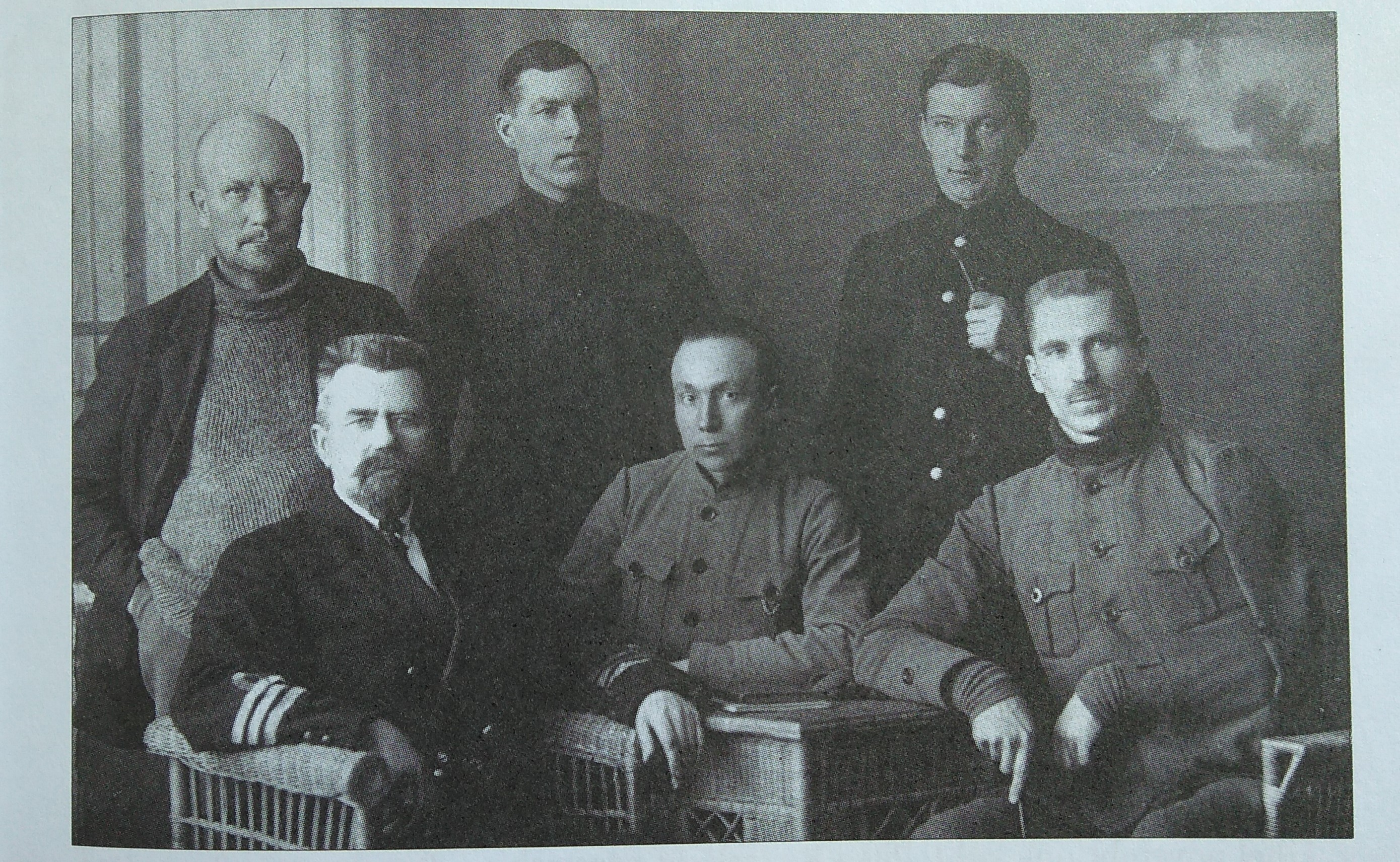 Soomusrongide divisjoni juhtkond Vabadussõja ajal koos Johan Pitkaga . Istuvad (vasakult): Eesti Merejõudude juhataja Johan Pitka, Soomusrongide divisjoni ülema kohuseid täitev kapten Anton Irv ja haiglaravil viibiv kapten Karl Parts. Seisavad vasakult: Soomusrongide divisjoni liikumis osakonna ülem Julius Trubock, kapten Karl Partsi adjutant leitnant Johannes Eisenberg ja Soomusrongide divisjoni indendant Mihkel Piperal (1919. aasta kevad-talvel)